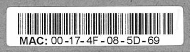 可取國際產品MAC位址條碼塑膠貼紙一張。